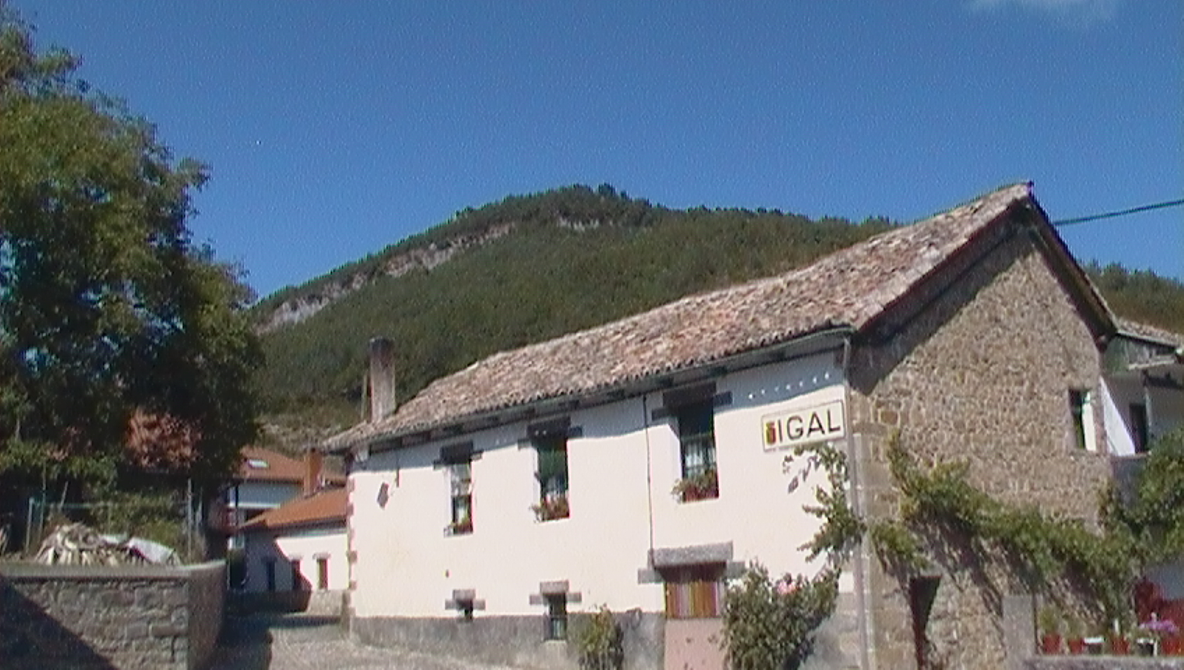 Igal - Vista del centro